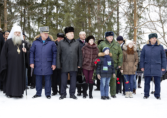 Открытие мемориальной плиты Героя Российской Федерации подполковника Олега Пешкова в селе Косиха Алтайского края. На фото слева направо: Митрополит Барнаульский и Алтайский Сергий, главком ВКС Виктор Бондарев, губернатор Алтайского края Александр Карлин, вдова Олега Пешкова Гелена Юрьевна, сын, брат и дочь Олега Пешкова, Константин Мурахтин